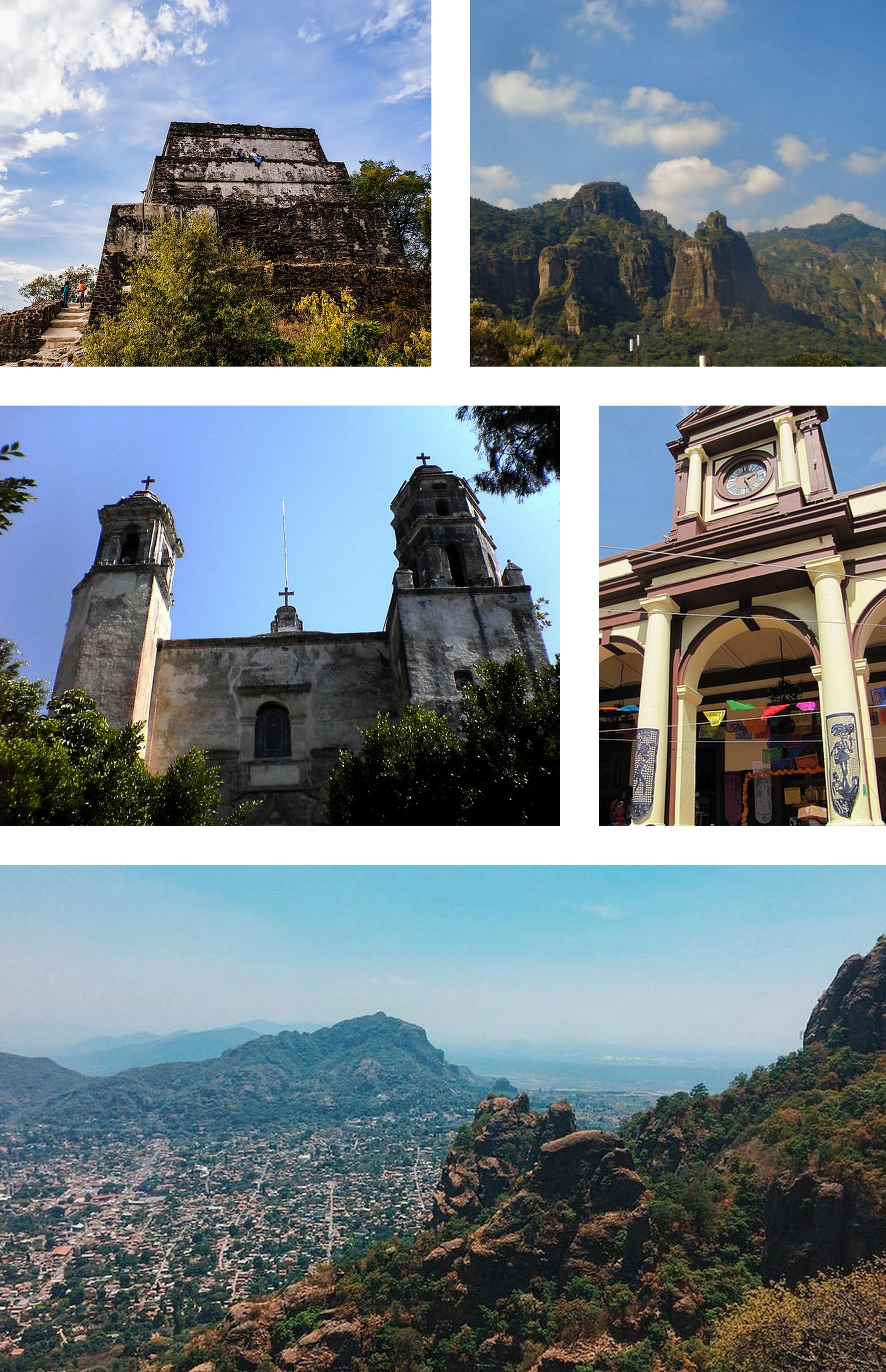 Montaje creado a partir de cinco imágenes en Wikimedia Commons: File:Tepoztlan Natasha Zadorozhnaya.jpg File:Tepoztlan (5074520967).jpg File:Iglesia de Tepoztlan - panoramio.jpg File:Palacio Municipal de Tepoztlán.jpg File:Pirámide de Tepoztlán..jpg